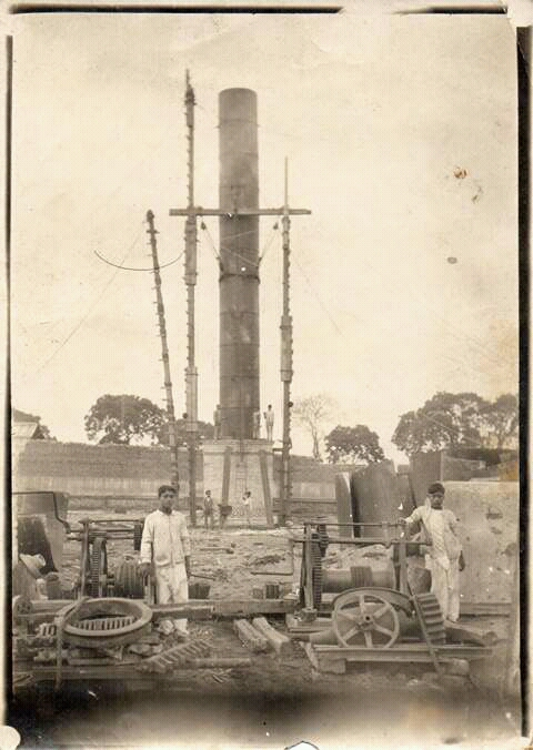 El chacuaco es como se conoce a la chimenea principal del ingenio, es muy notorio porque se aprecia desde varios kilómetros de distancia